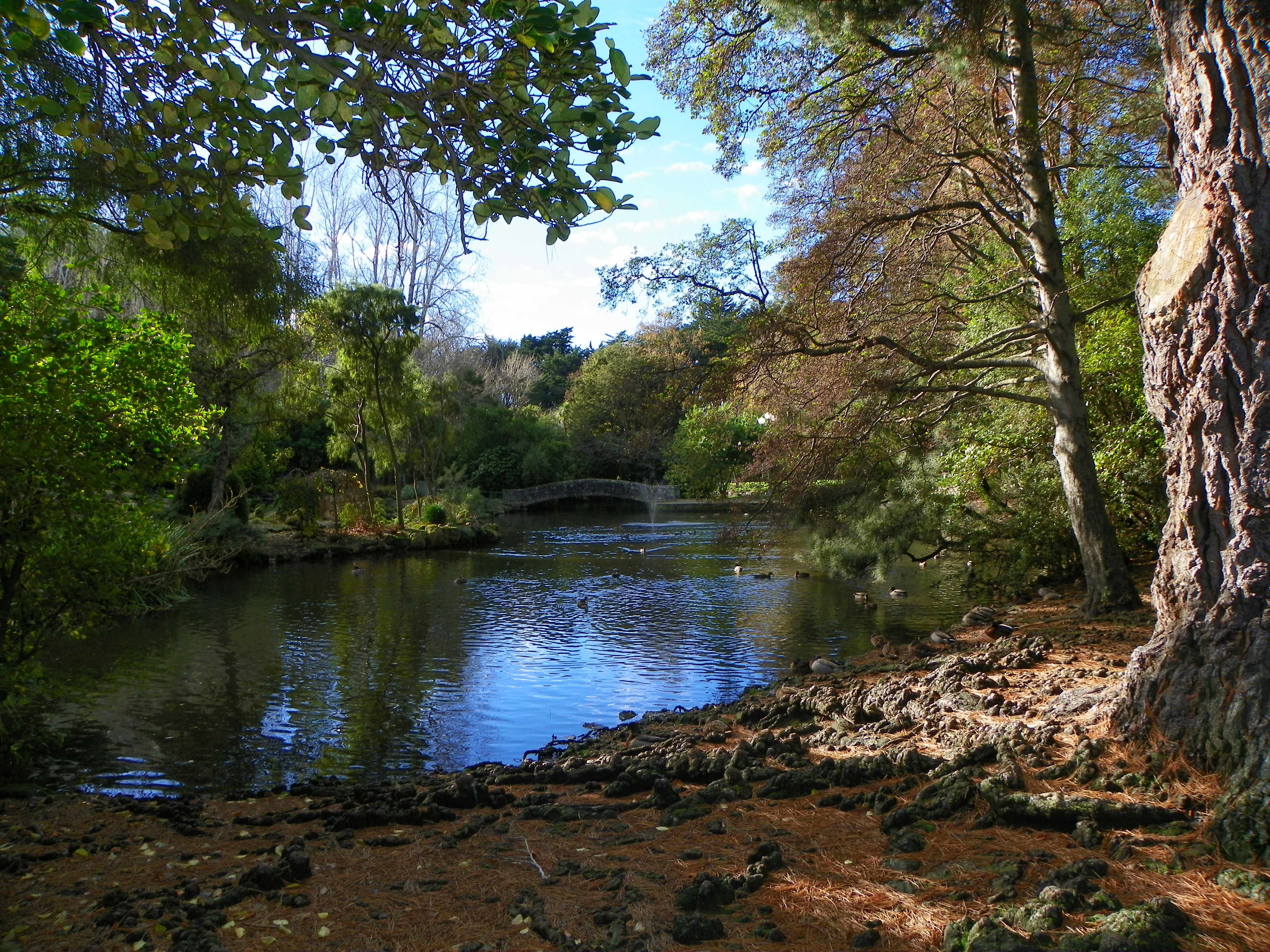 Parque De La Reina, Invercargill, Nueva Zelanda